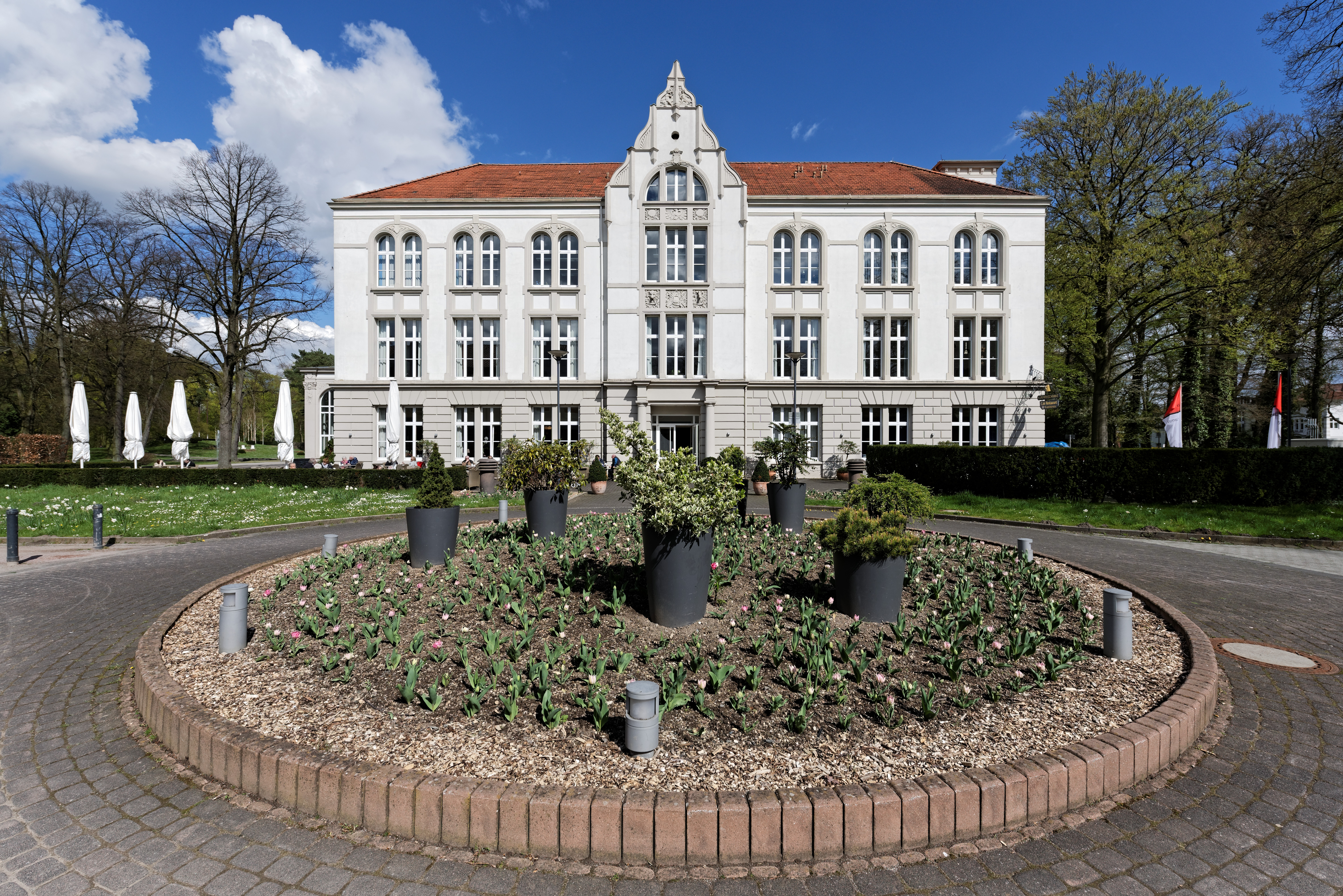 Kurhaus an der Ostenallee im Stadtbezirk Uentrop der kreisfreien Stadt Hamm in Nordrhein-Westfalen This is a photograph of an architectural monument.